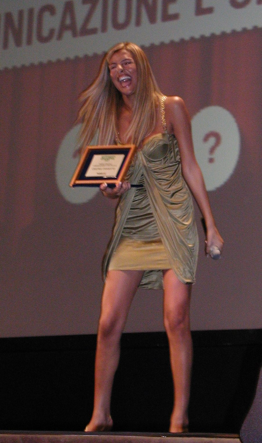 Cristina Chiabotto premiata al Gran Prix Pubblicità 2007